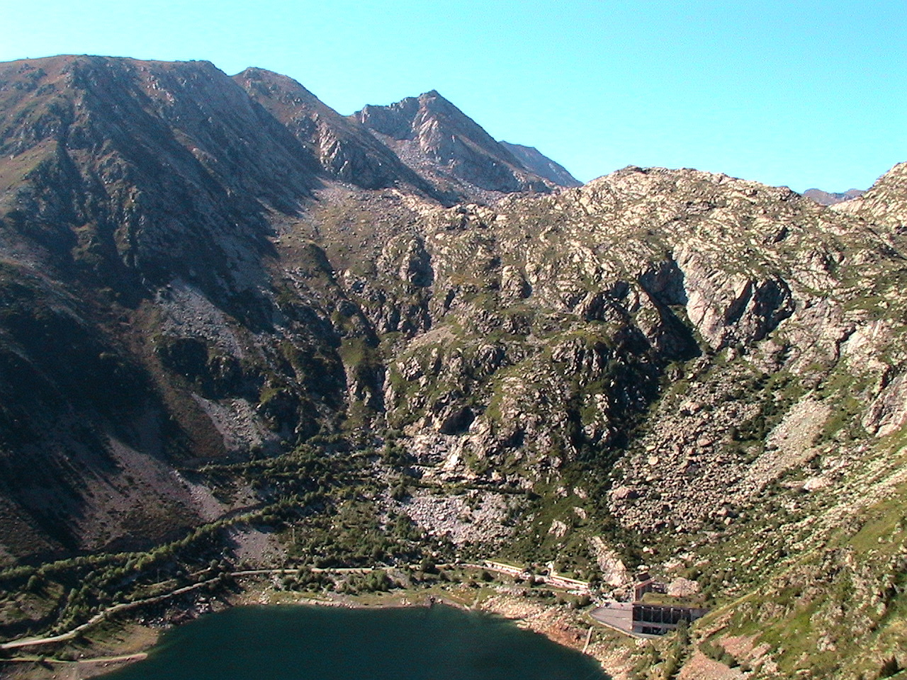 Part occidental del cercle de Sallente, amb el pic Fosser i la cubeta de l'estany Fosser sota seu. Estanys de Cabdella (Pallars Jussà)